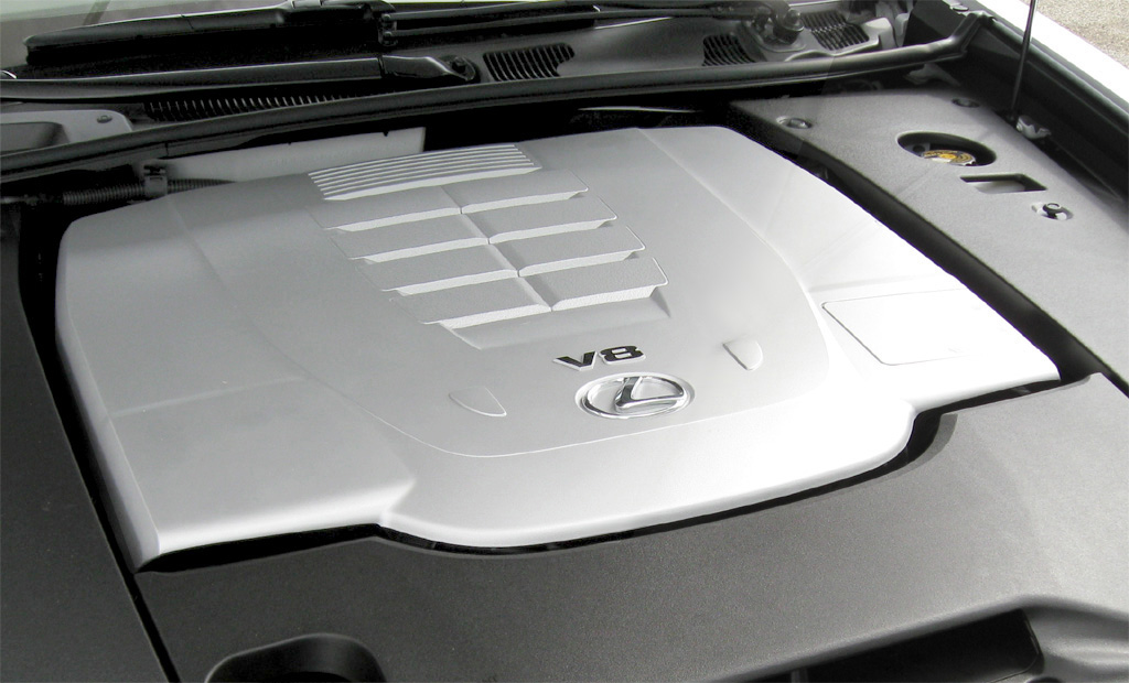 Lexus 1UR-FSE engine